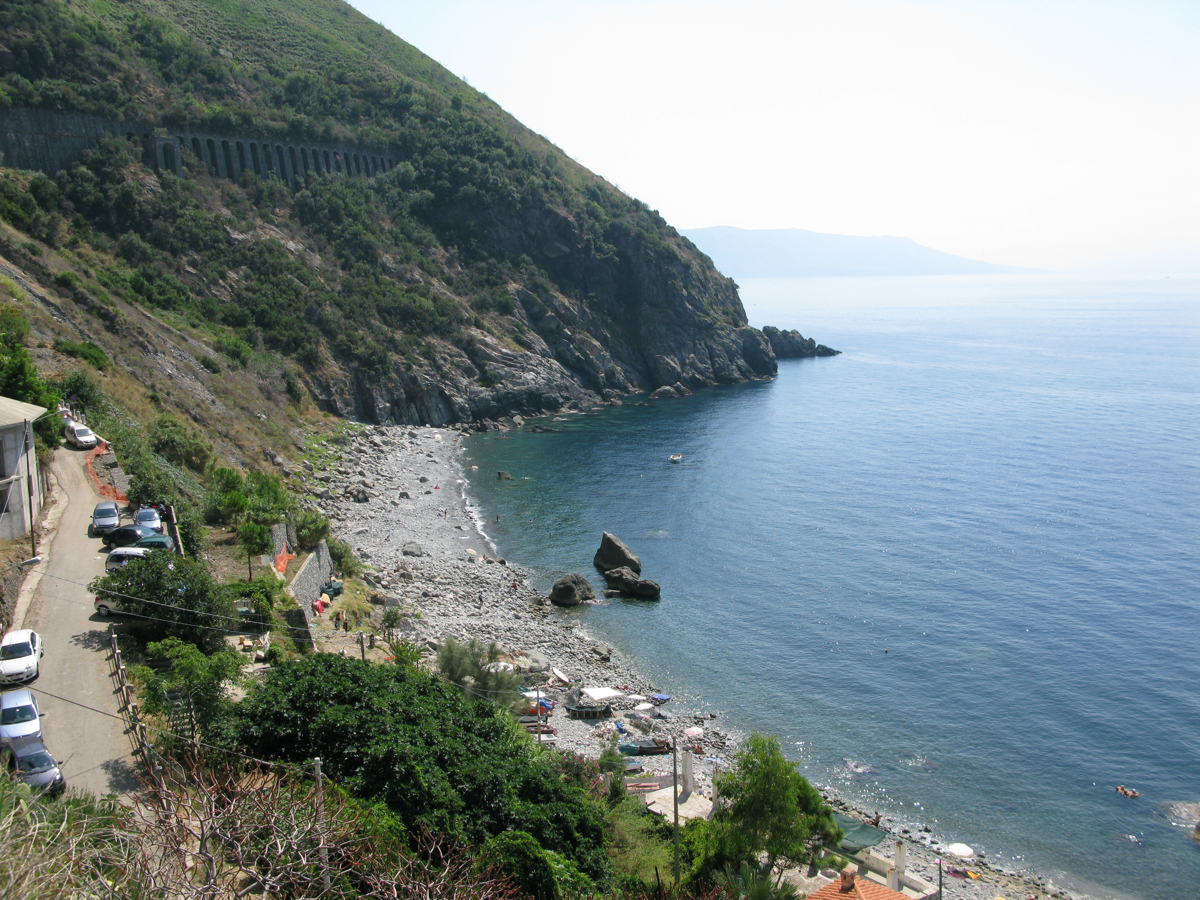 Marina di Palmi (Marinella)